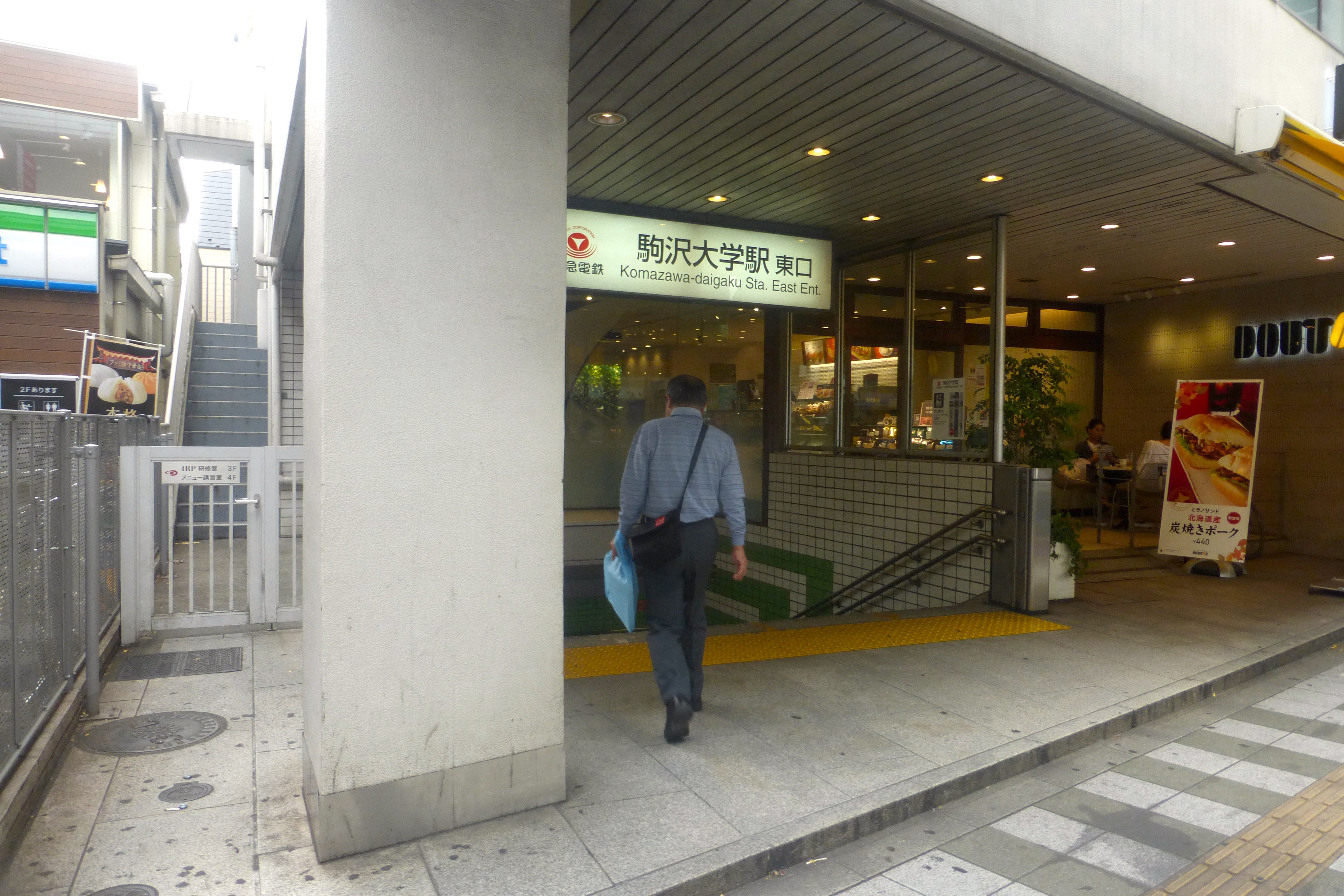 Komazawa-daigaku Station east exit (駒沢大学駅の東口)